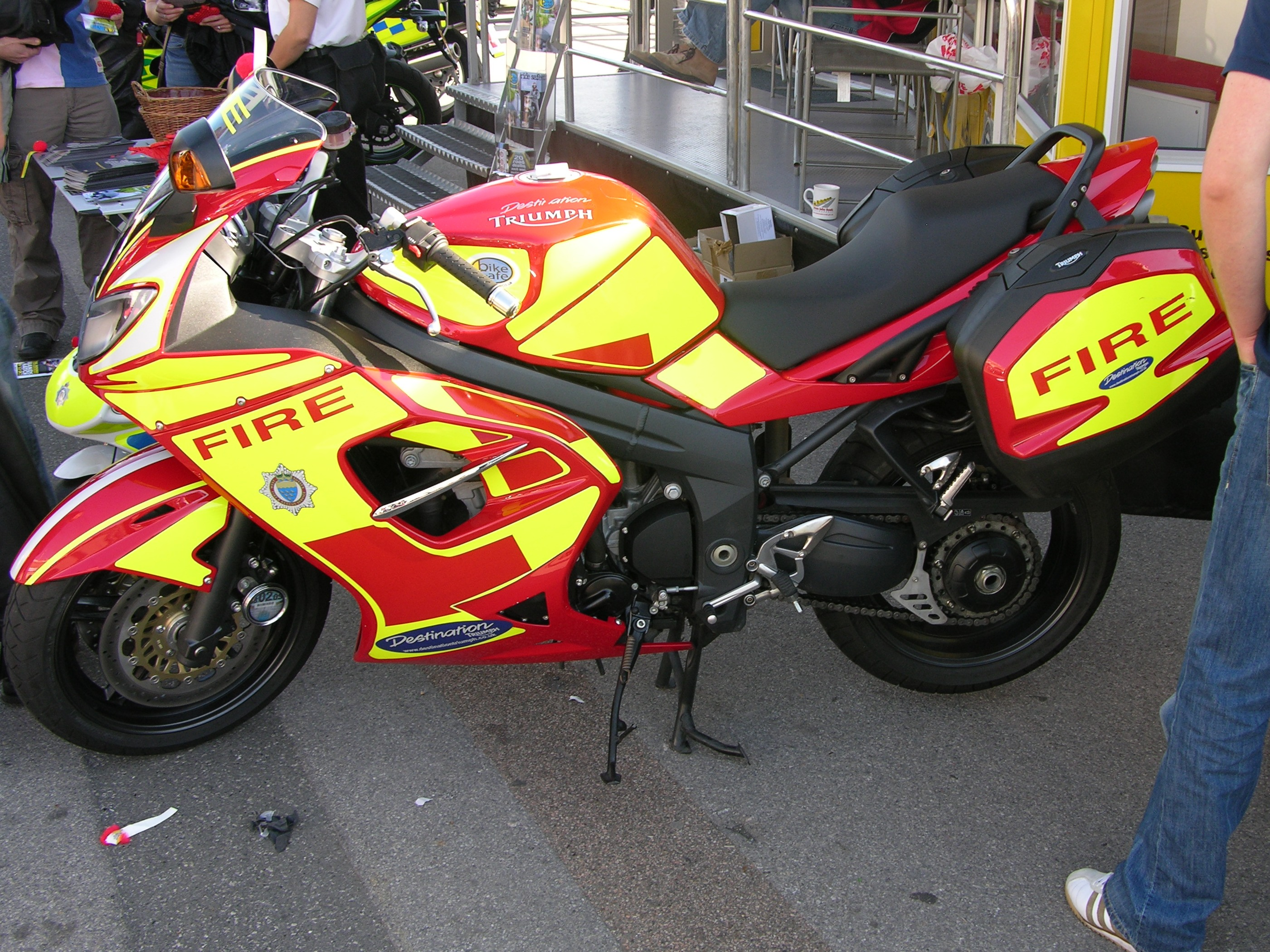 Fire Bike!